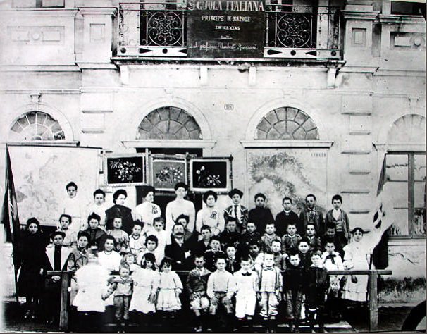 Uma das aulas da Sociedade Príncipe de Nápoles.